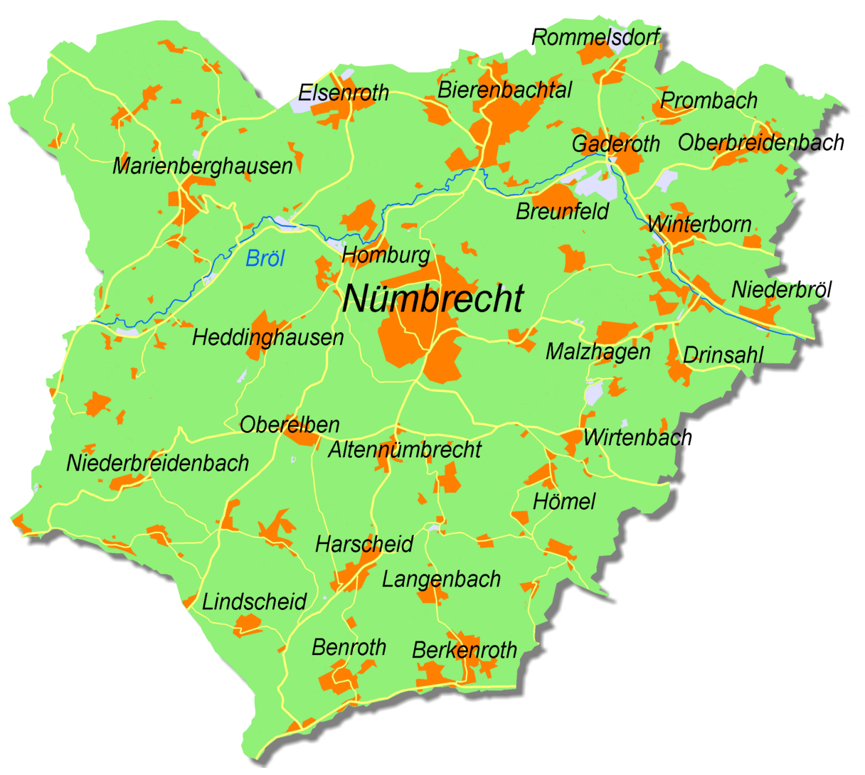 Karte von Nümbrecht, Oberbergischer Kreis